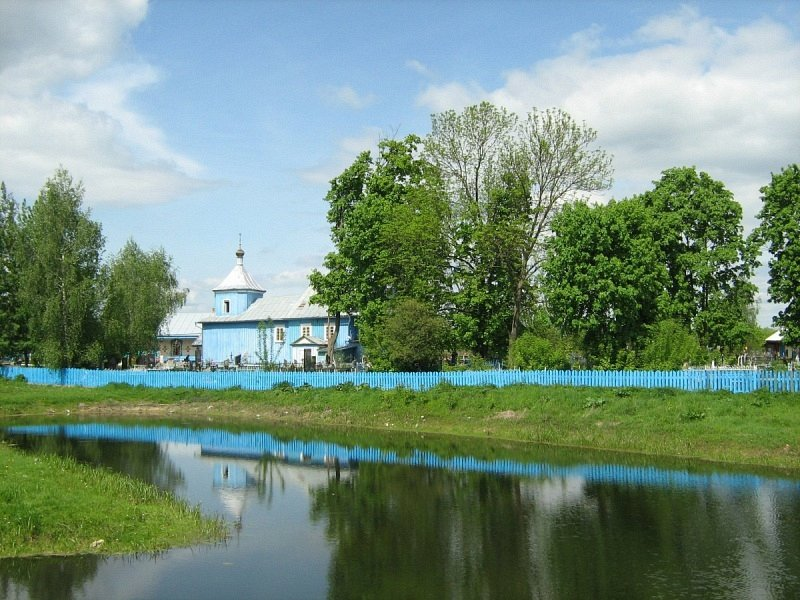 Тураў. Усехсвяцкая царква